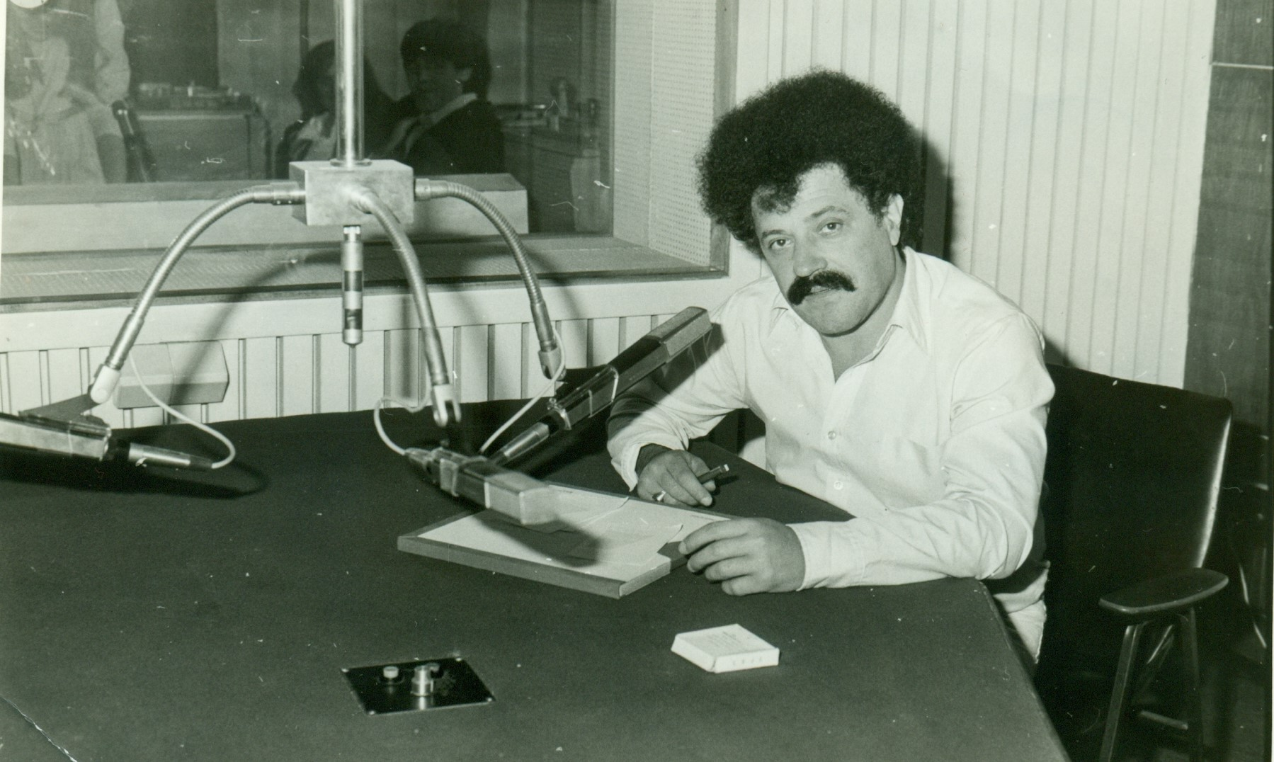 Želimir Altarac Čičak - radio show Charade of acoustic